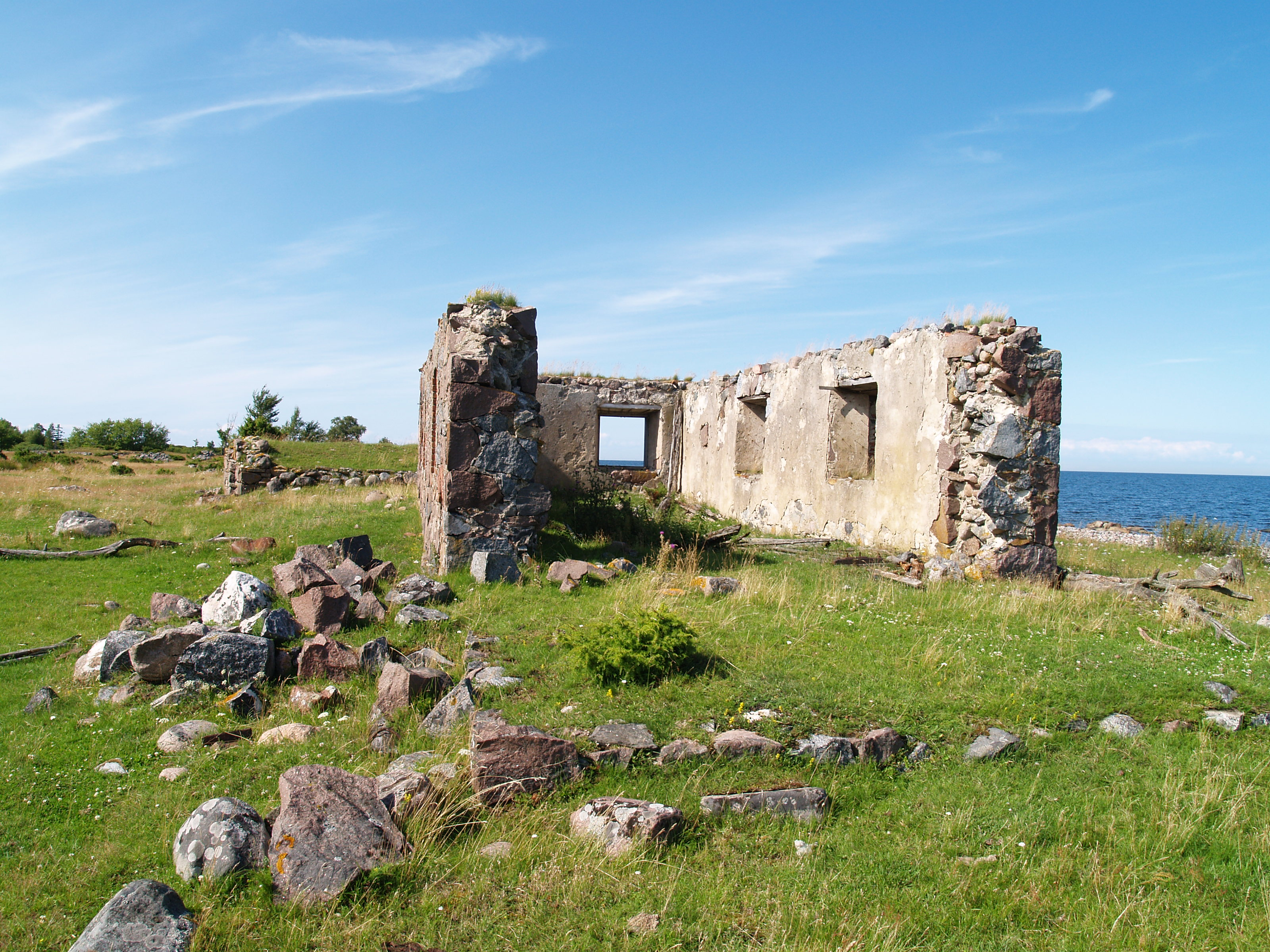 Majavaremed Aksi saarel.